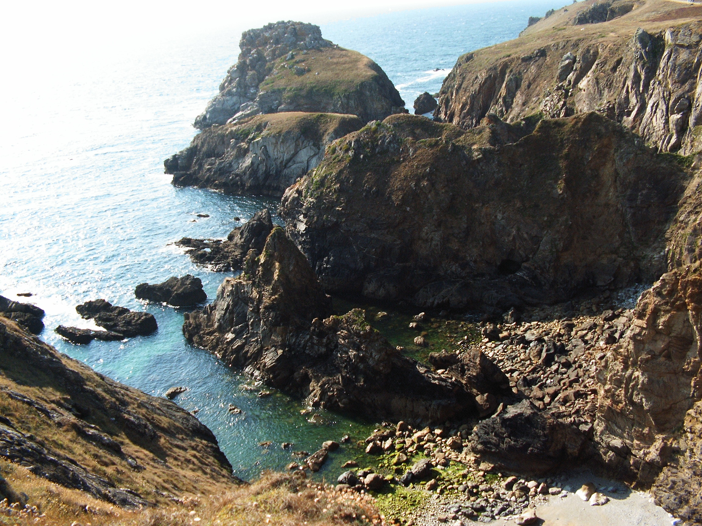 Felsformationen am Pointe du Van in der Bretagne